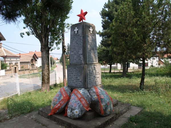 Spomenik žrtvama četničkog masakra u Drugovcu pokraj Smedereva.